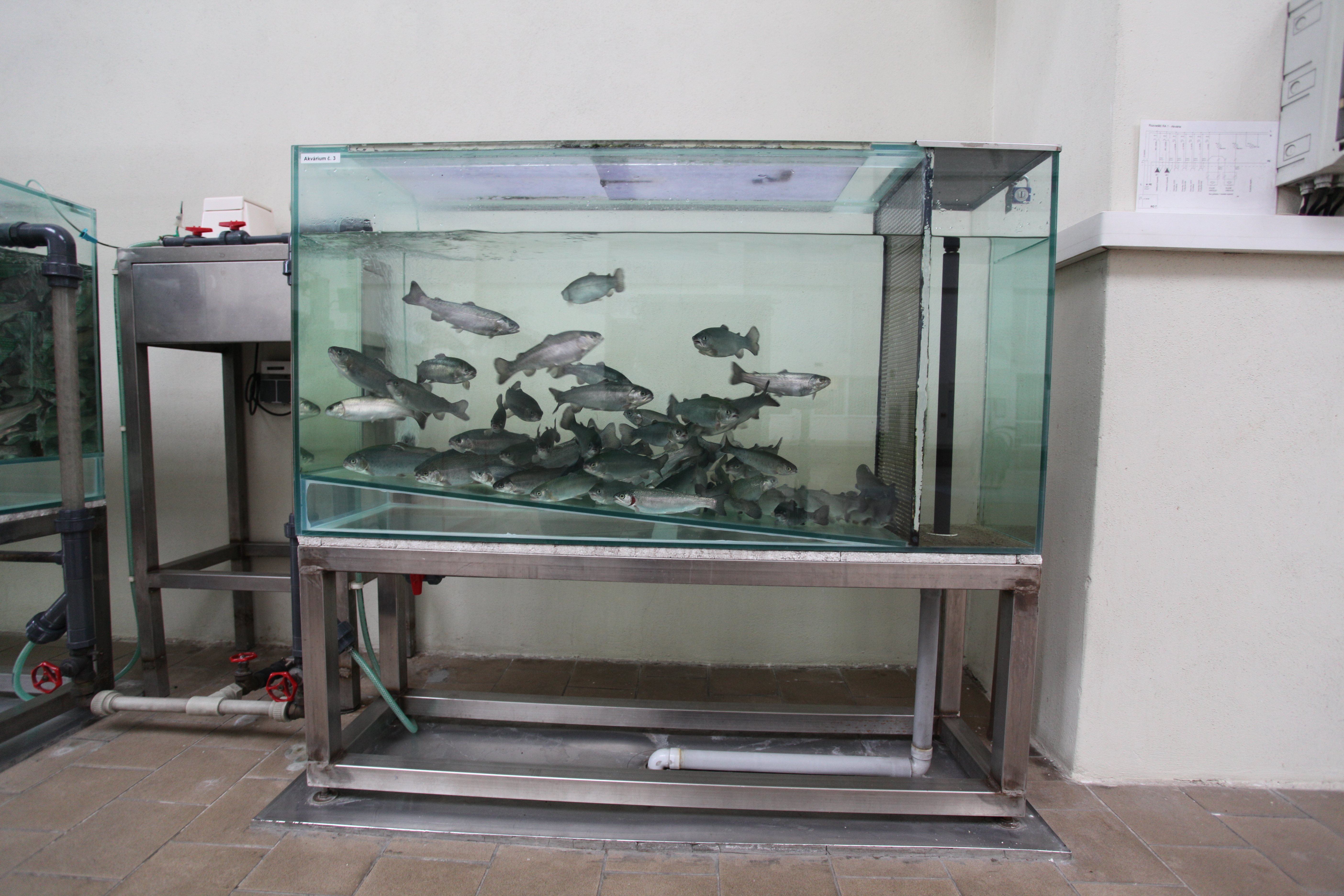 V současné době se na vodárnách jako primární detektor znečištění pitné vody využívá pstruh duhový neboli pstruh americký duhový (Oncorhynchus mykiss). Pstruh duhový pochází ze Severní Ameriky, kde se s ním můžeme setkat ve volné přírodě. V mírném pásmu jiných oblastí se vysazuje jen ke sportovnímu rybolovu či se chová pro maso. V případě, že by došlo k úhynu těchto ryb indikuje to znečištění pitné vody. Přívod pitné vody by tak včas byl odstaven. Zdroje: Wikipedia